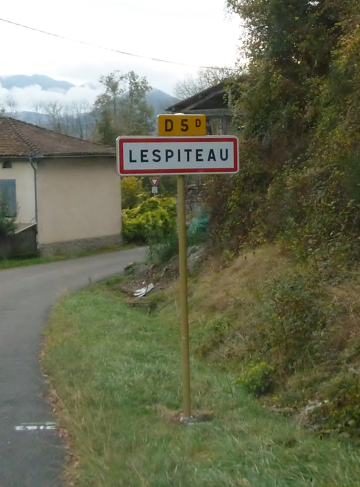 Entrée dans Lespiteau